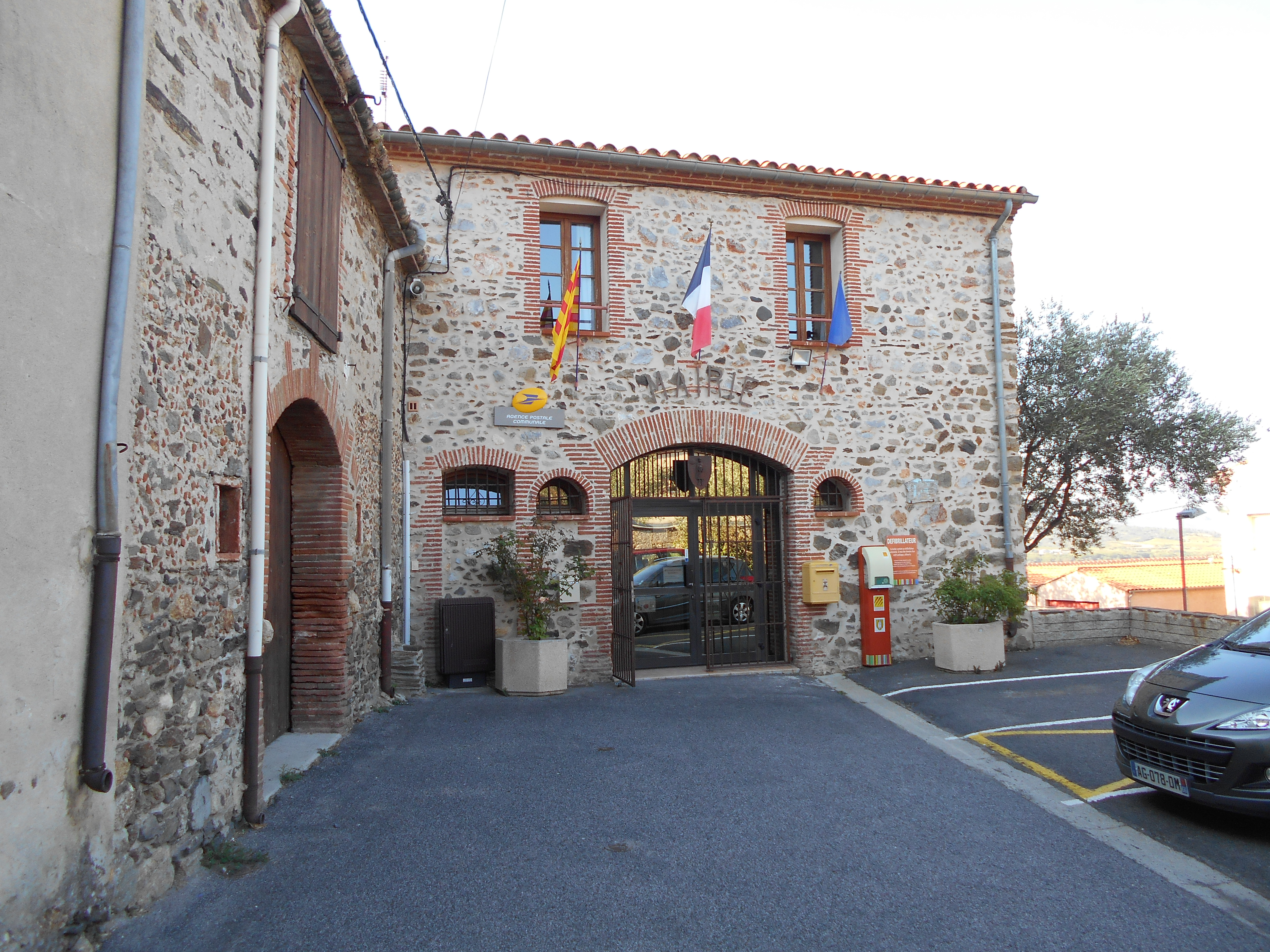 Actual Casa del Comú de Montner